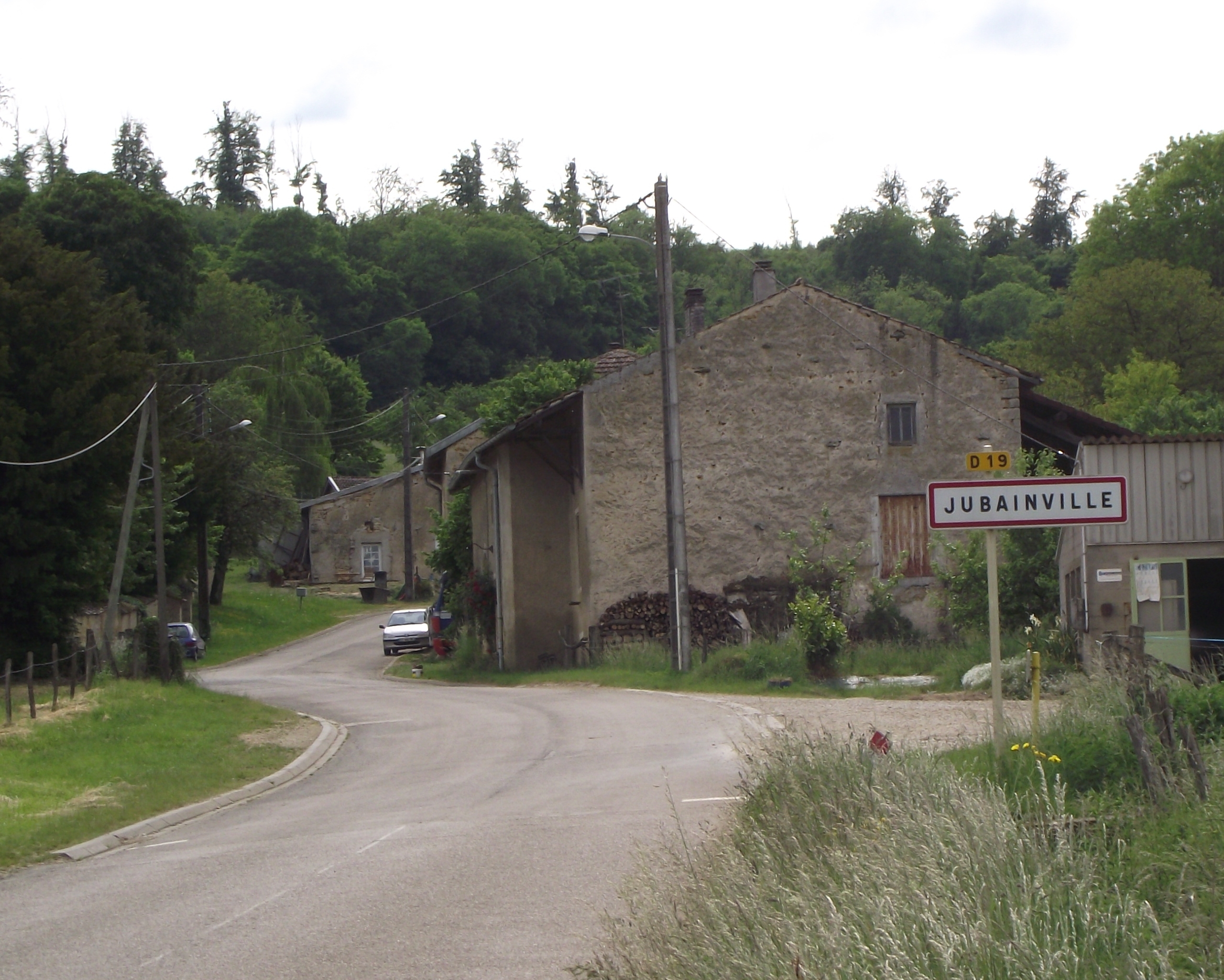 Endtrée de Jubainville en venant de Ruppes.